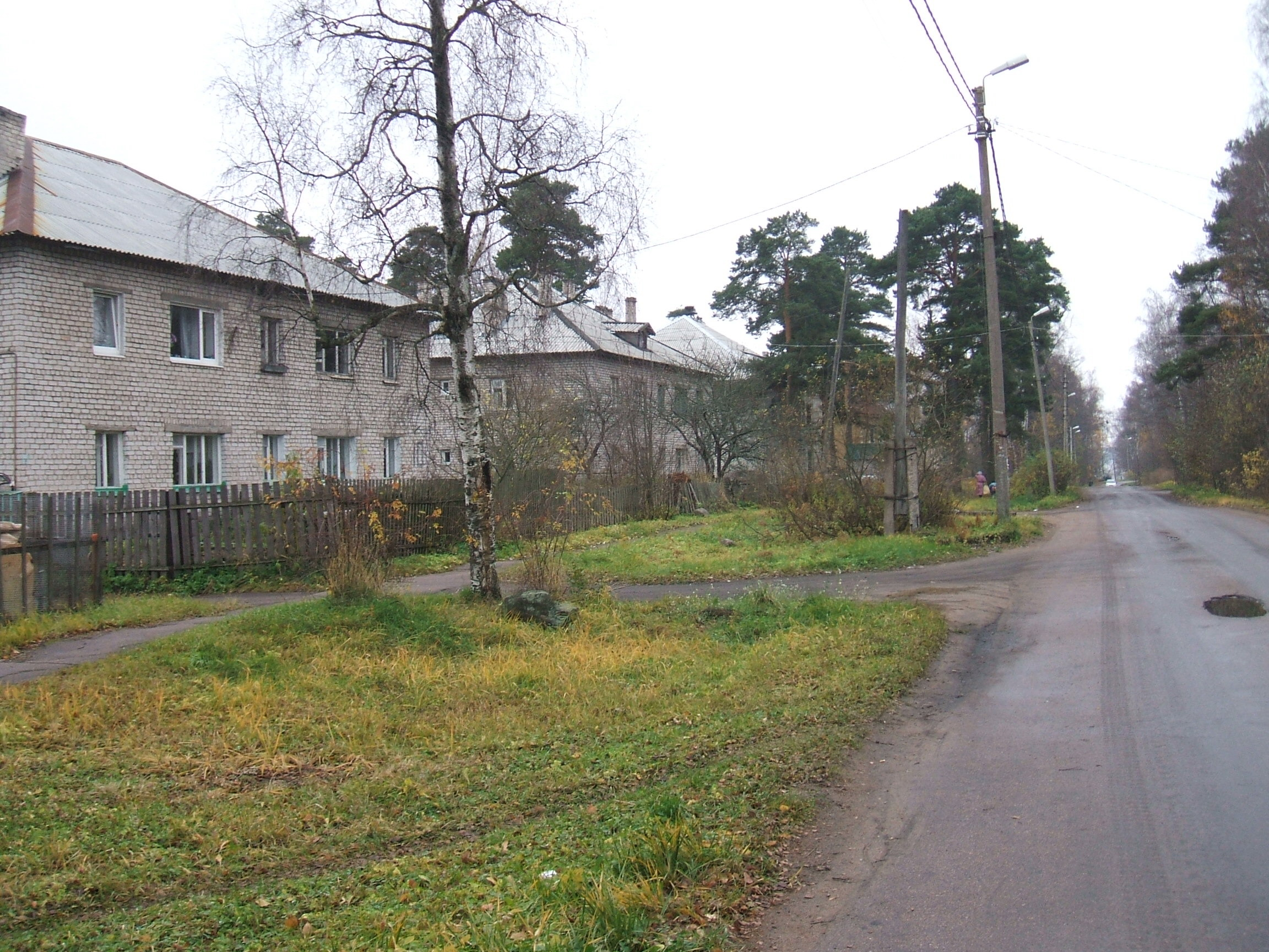 Приморск улицы